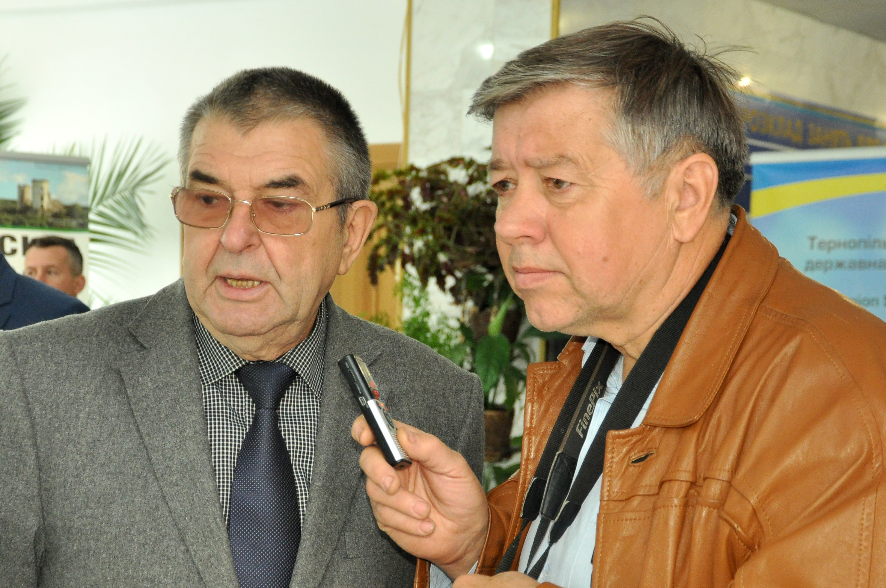 В українського вченого-комбустіолога Володимира Бігуняка бере інтерв’ю журналіст Олег Снітовський.